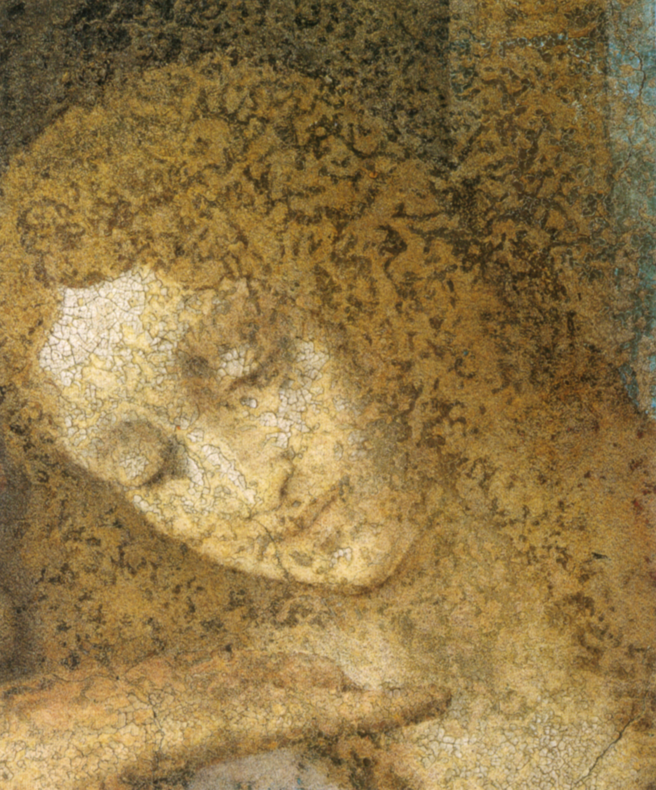 LEONARDO da Vinci The Last Supper Mixed technique, 460 x 880 cm Convent of Santa Maria delle Grazie, Milan